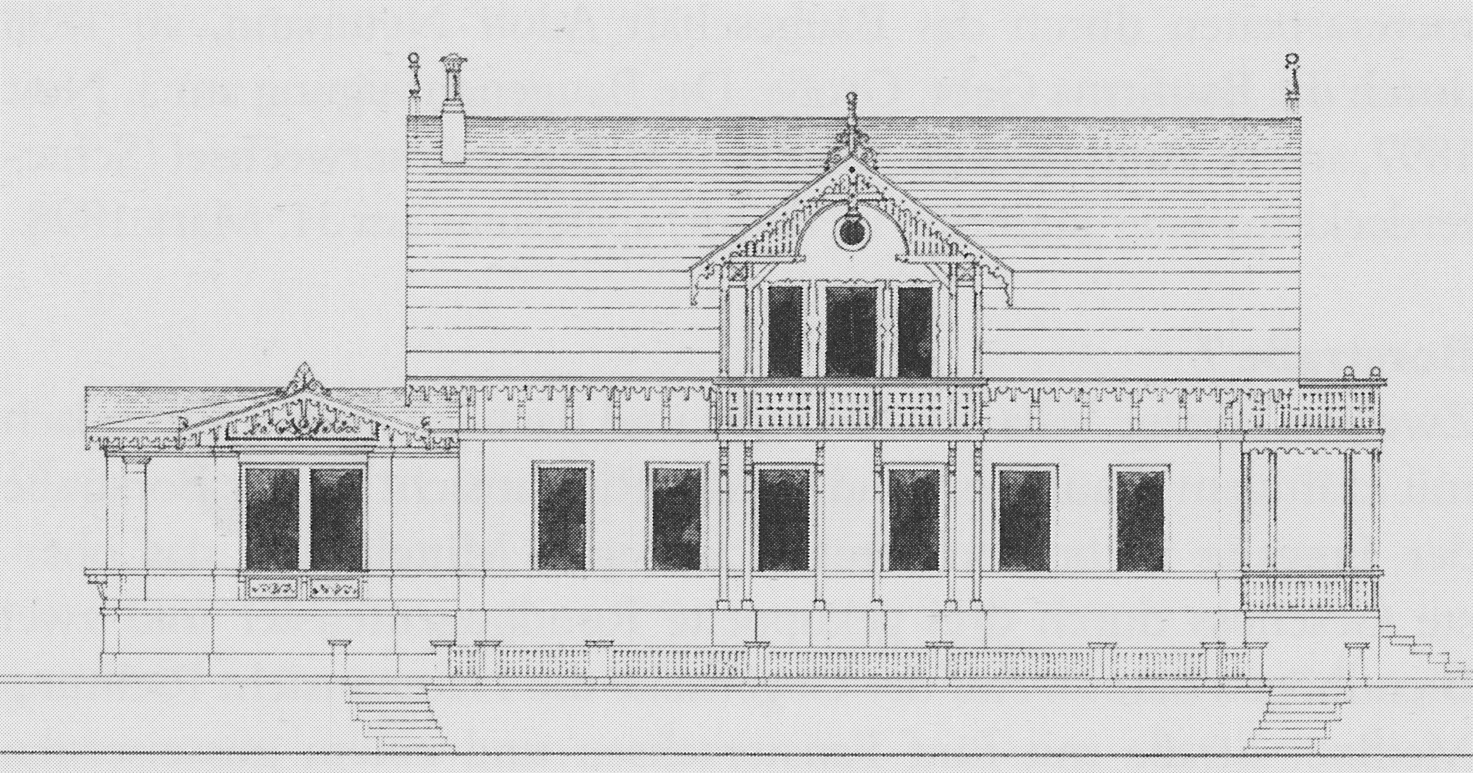 Radebeul, Villa Borstraße 17, Bauzeichnung Gartenseite, wohl Gustav Ziller, 1872